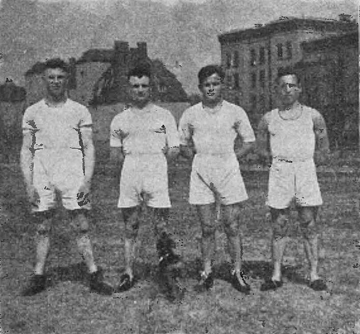 sierż. Leon Urbaniak, sierż. Jan Bartosik, wachm. Feliks Stamm, sierż. Roman Ostałowski (Centralna Wojskowa Szkoła Gimnastyki i Sportów w Poznaniu)